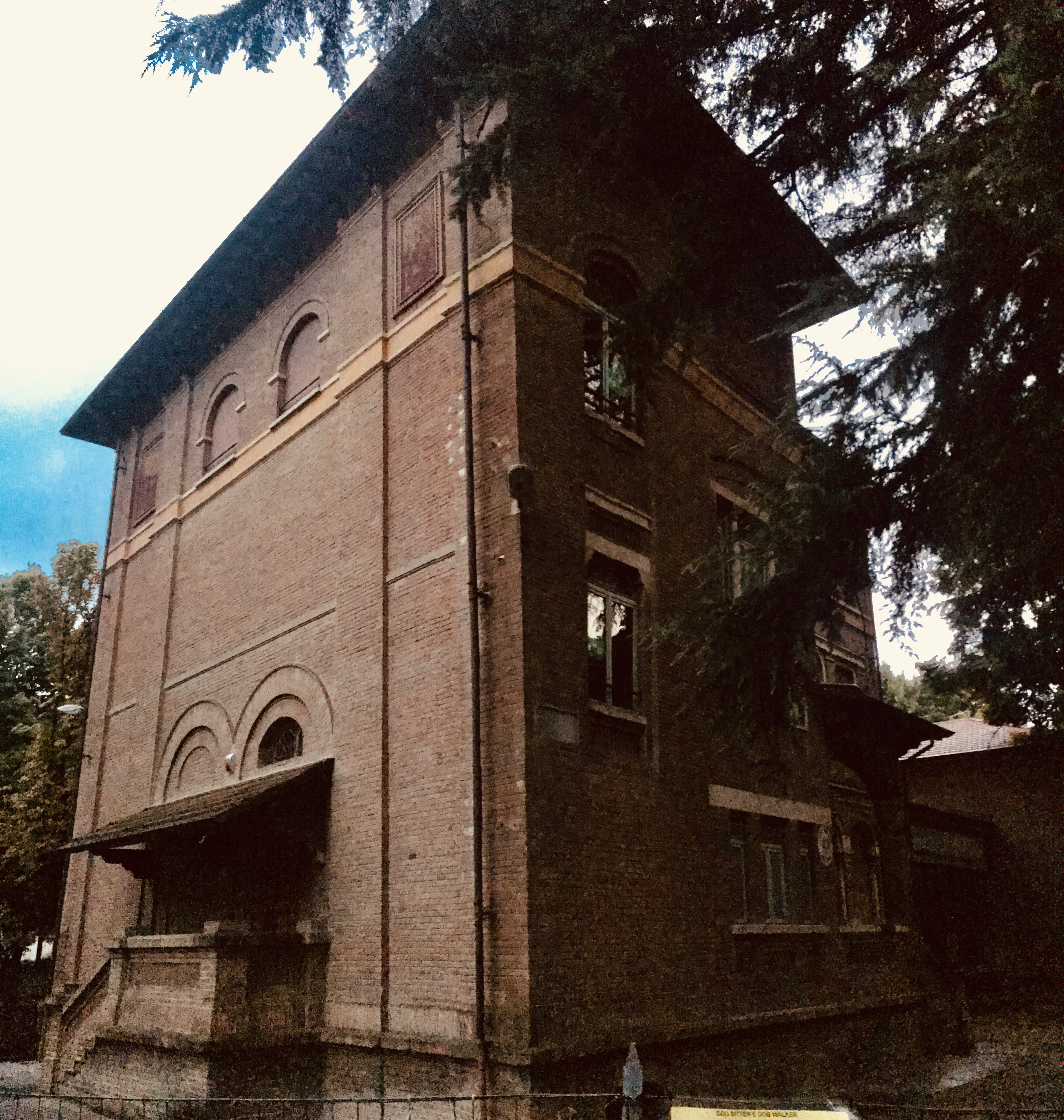 Scuola Matilde di Canossa, particolare